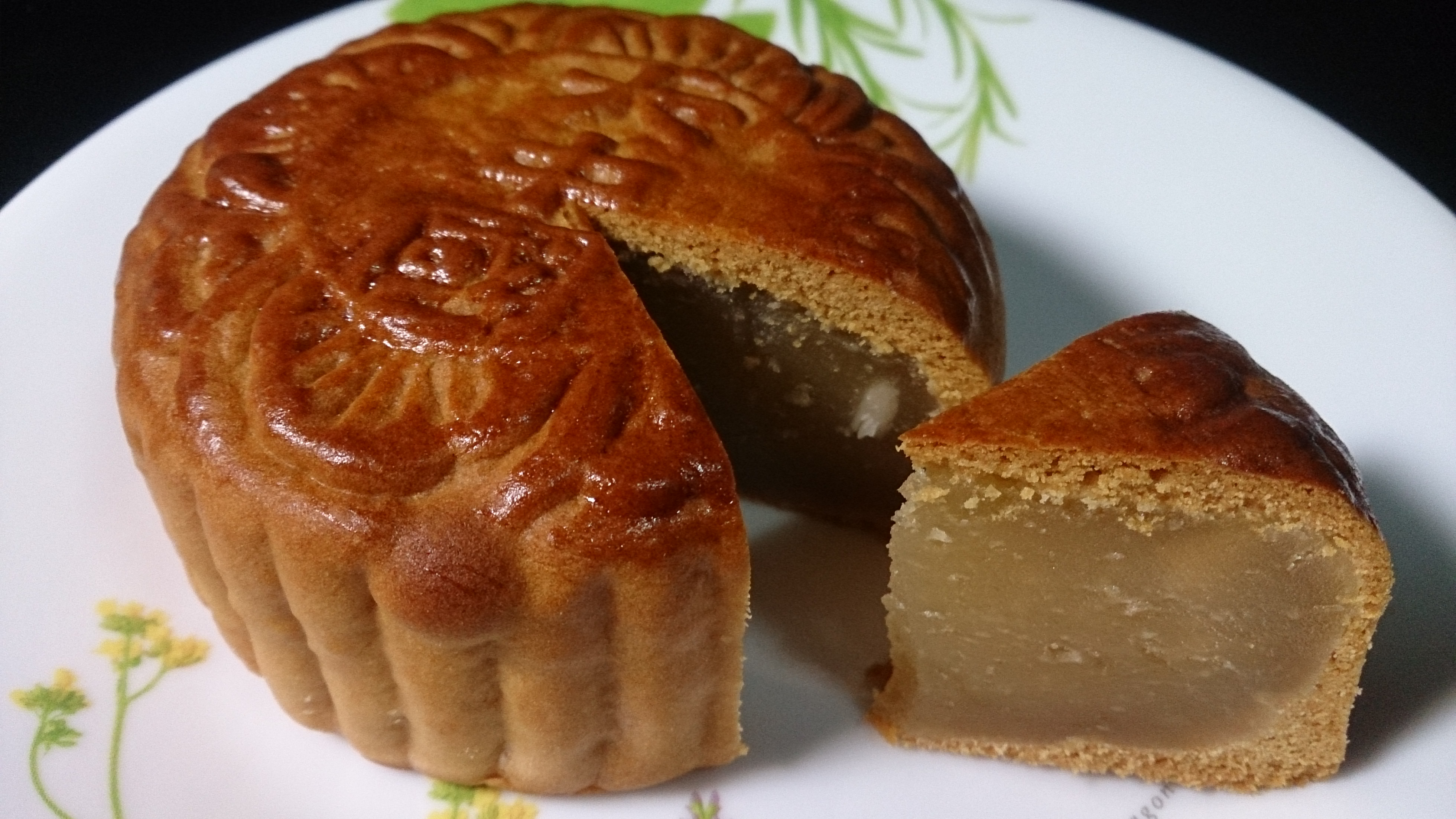 Mooncakes